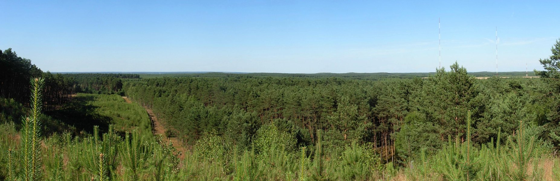 Widok ze szczytu wydmy śródlądowej - Puszcza Bydgoska